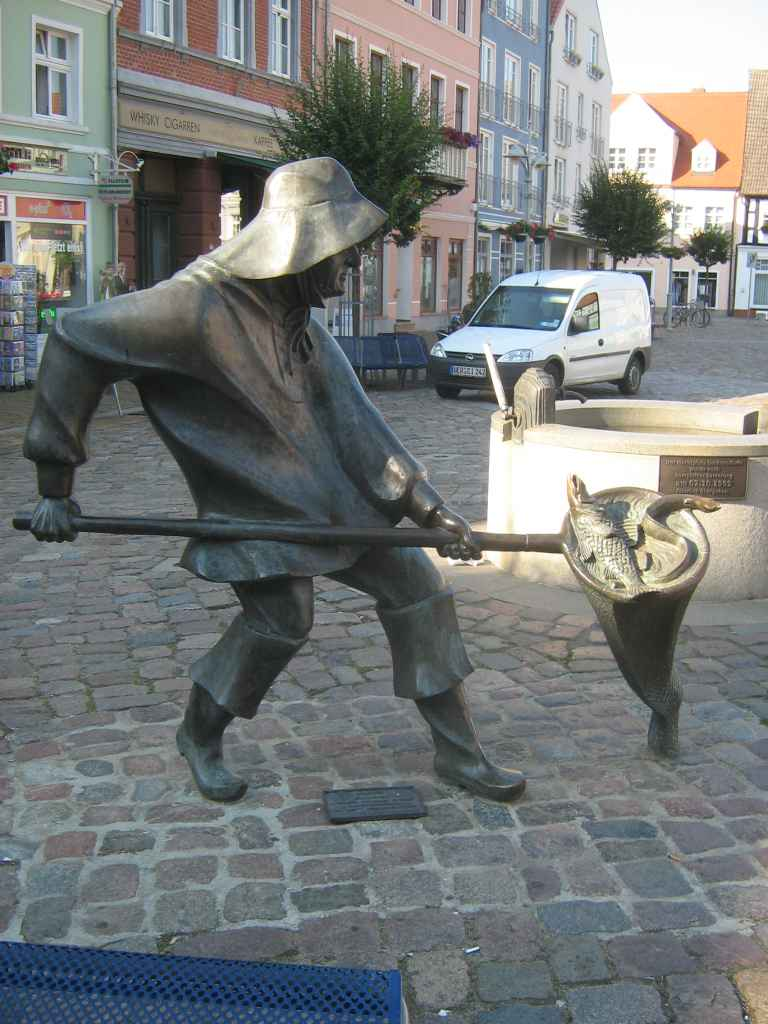 Fischersplastik auf dem marktplatz in Ueckermünde.